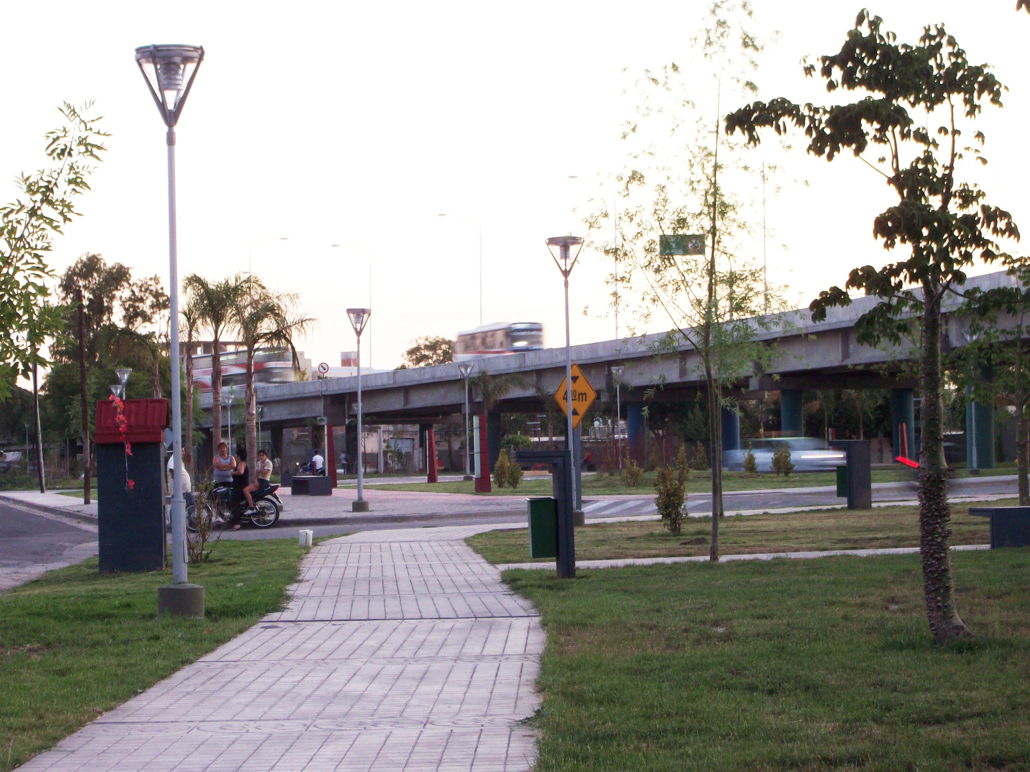 Viaducto y paseo de la terminal de ómnibus de Santiago del Estero.